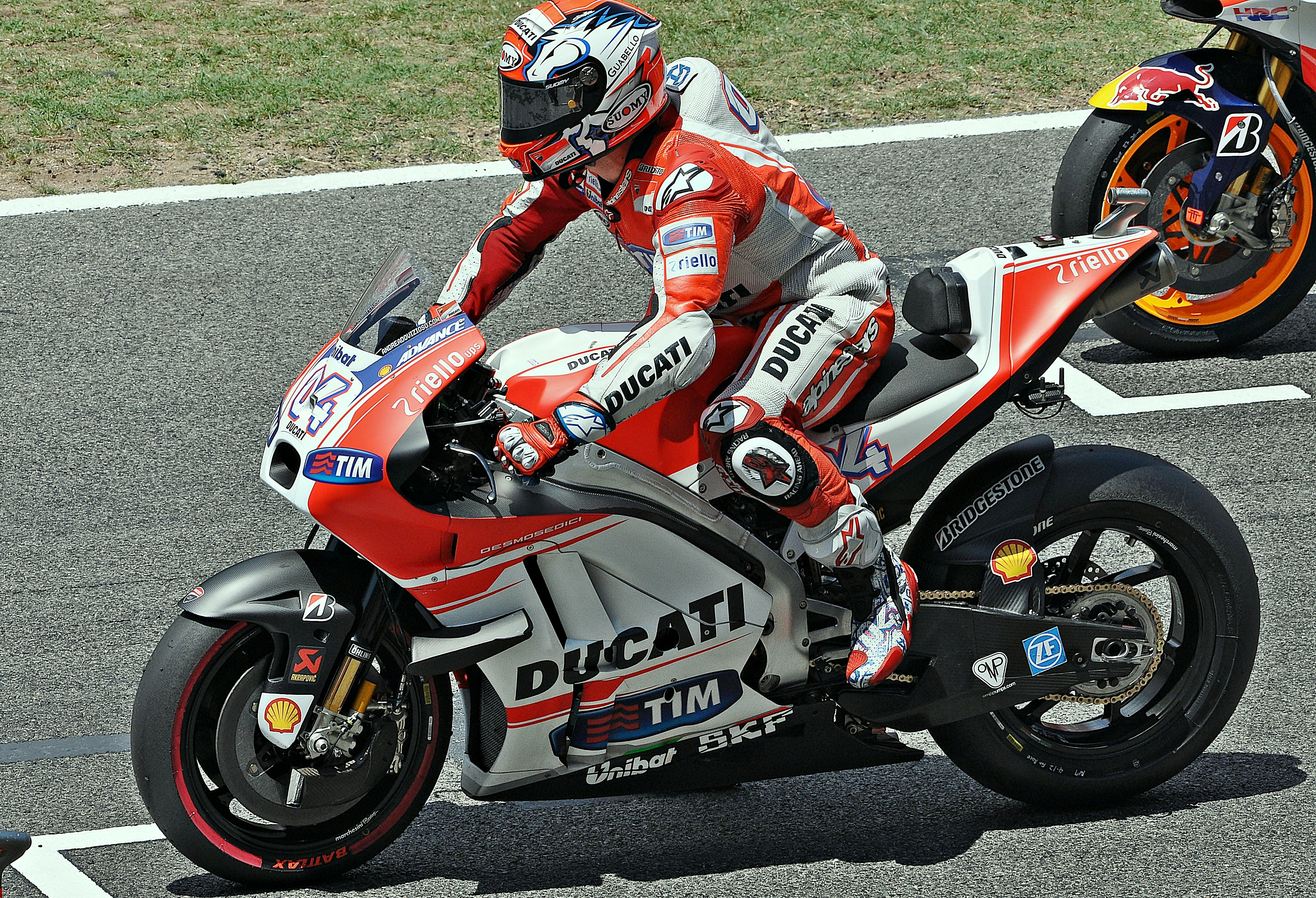 Gran premio de Cataluña